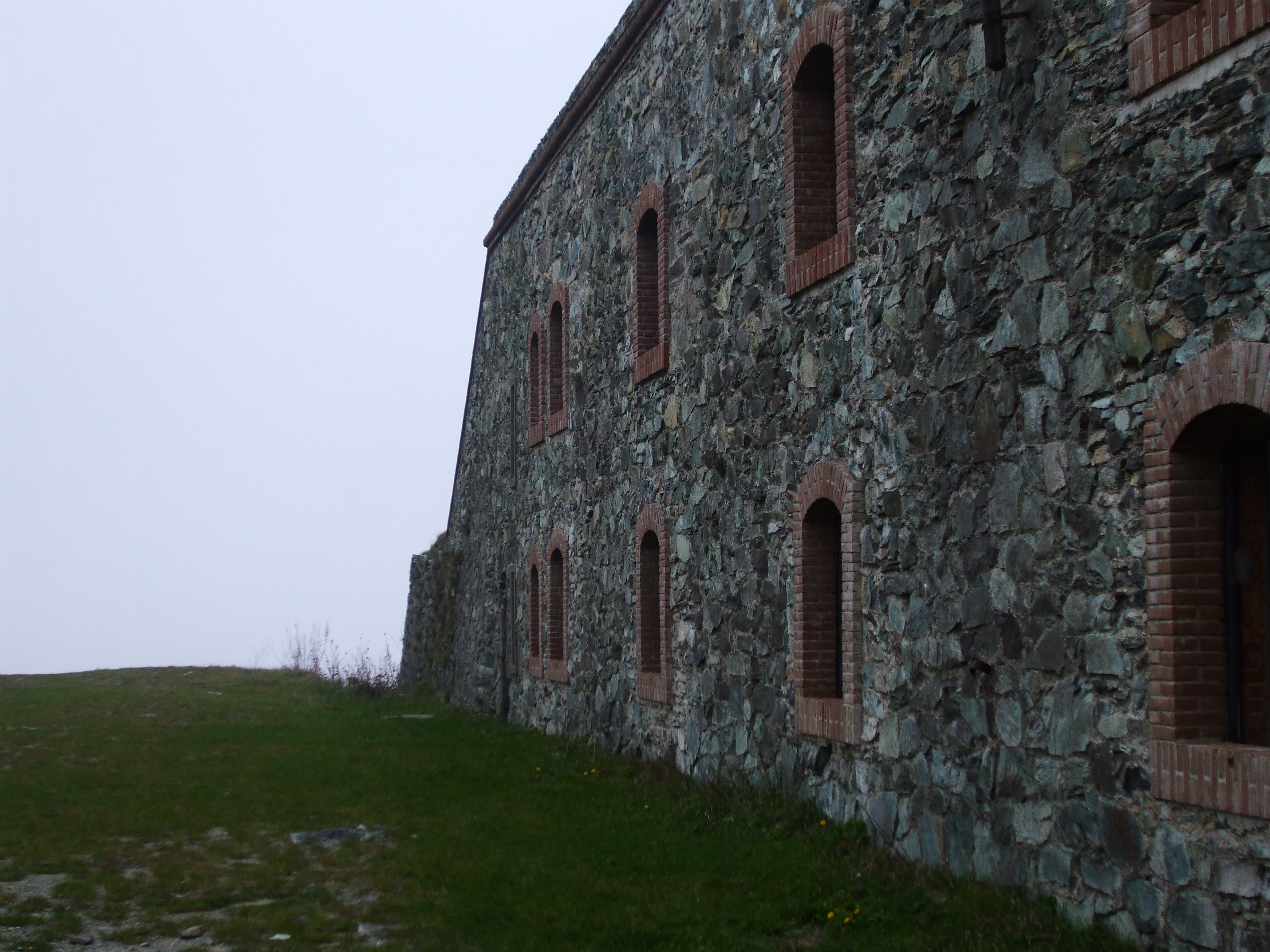 Roberto Manfredi (Riotforlife),foto personale scattata a Forte Geremia (Parco del Beigua) il 01/11/'09